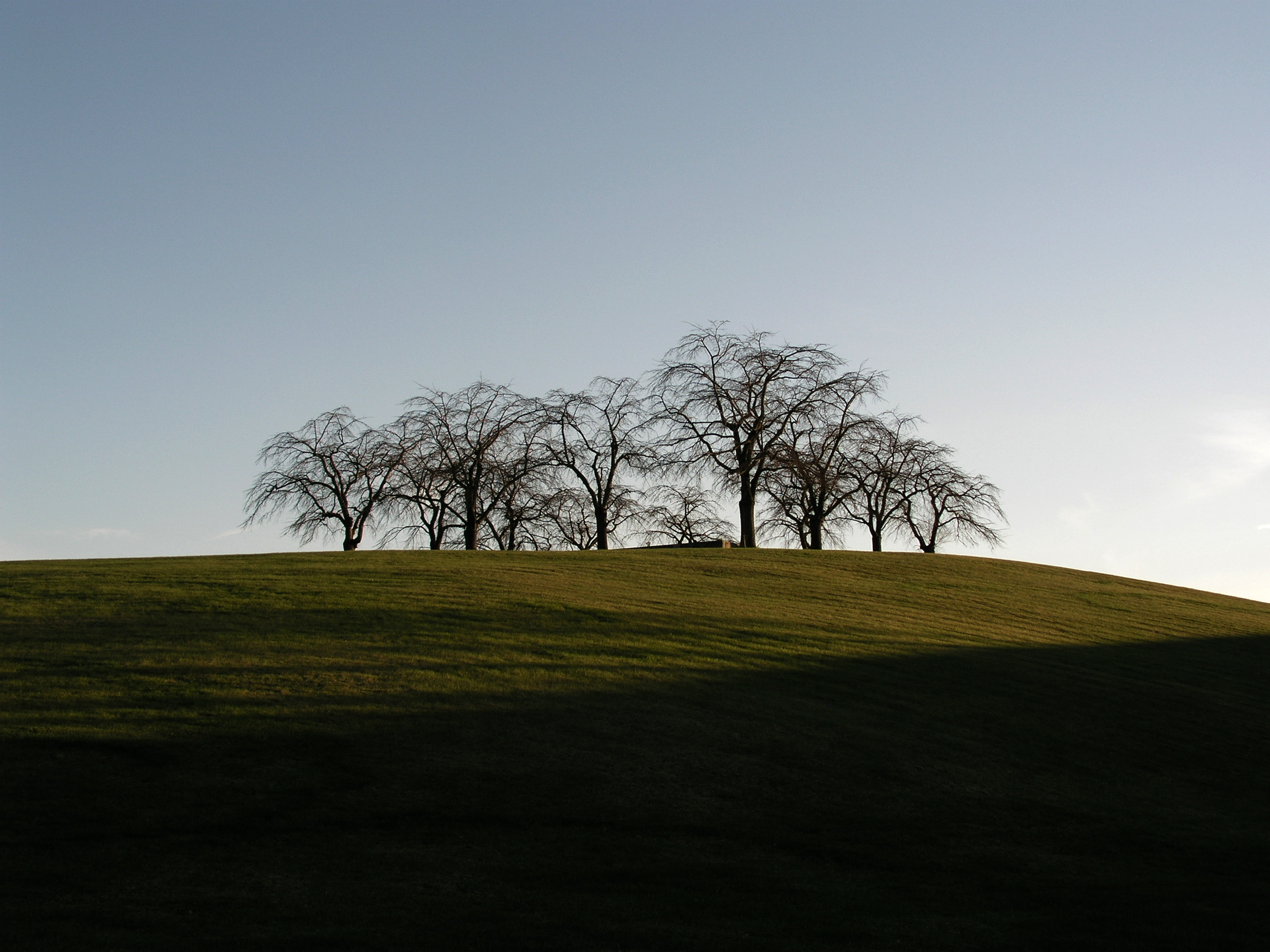 Skogskyrkogården, Stockholm, Sweden. Meditation grove.